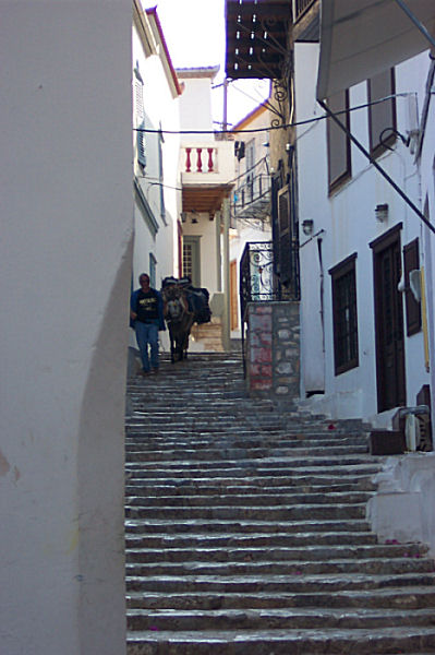 Street in Hydra